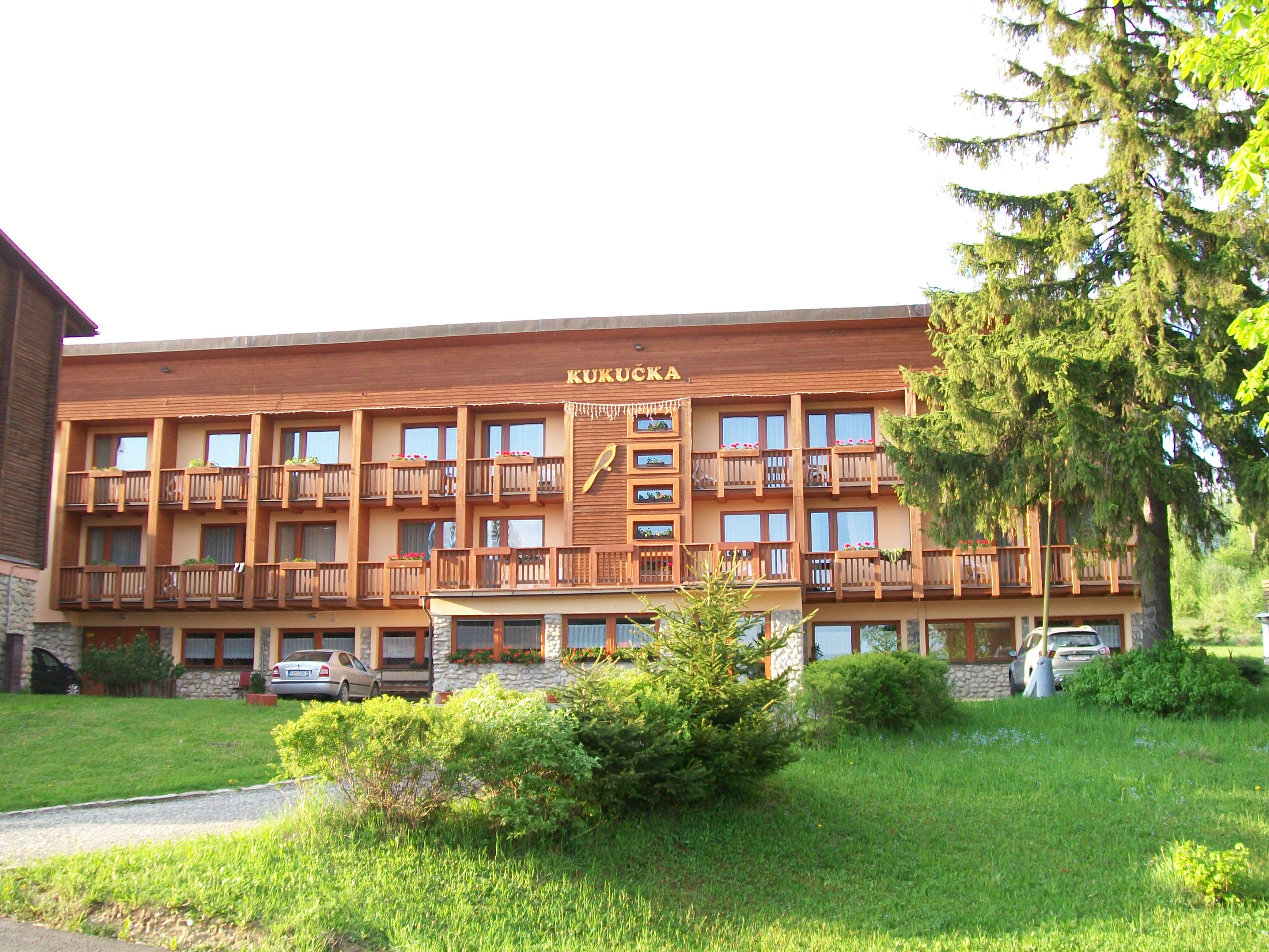 Penzión Kukučka v Tatranskej Štrbe